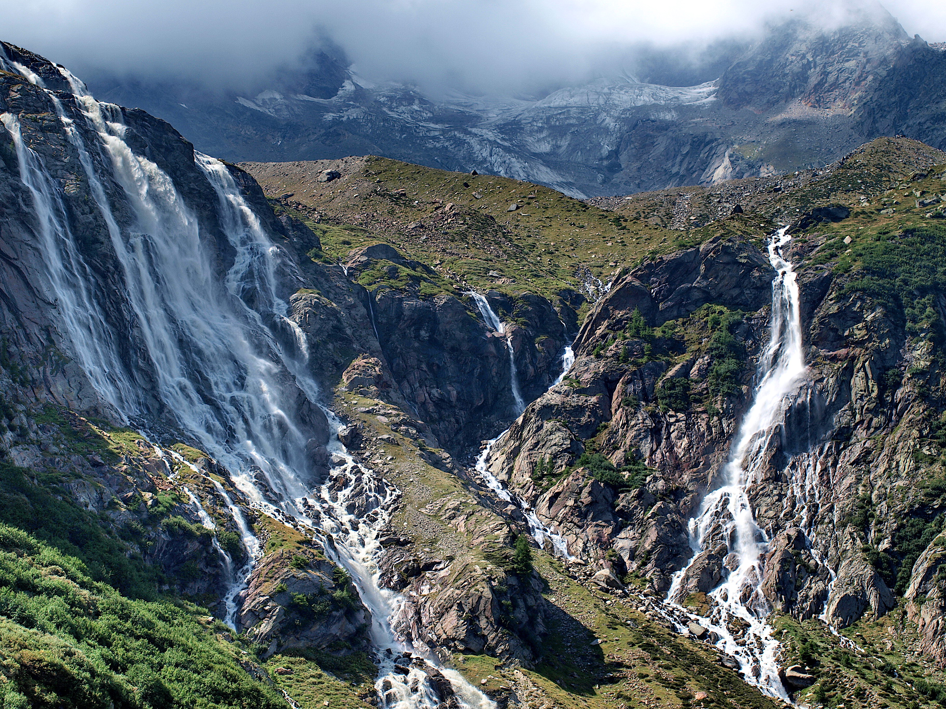 Lagina Wasserfälle im Laggintal